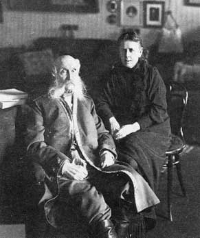 Портрет Александры Викторовны Богданович c мужем Евгением Васильевичем Богдановичем